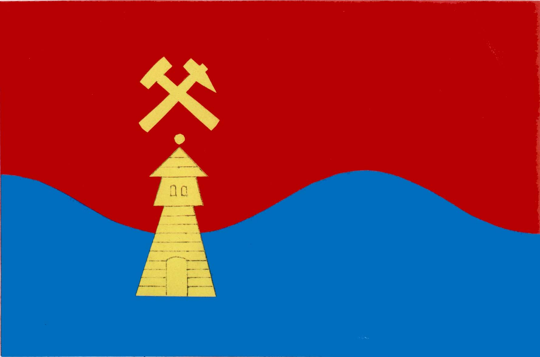 Česky: vlajka obce Suchovršice